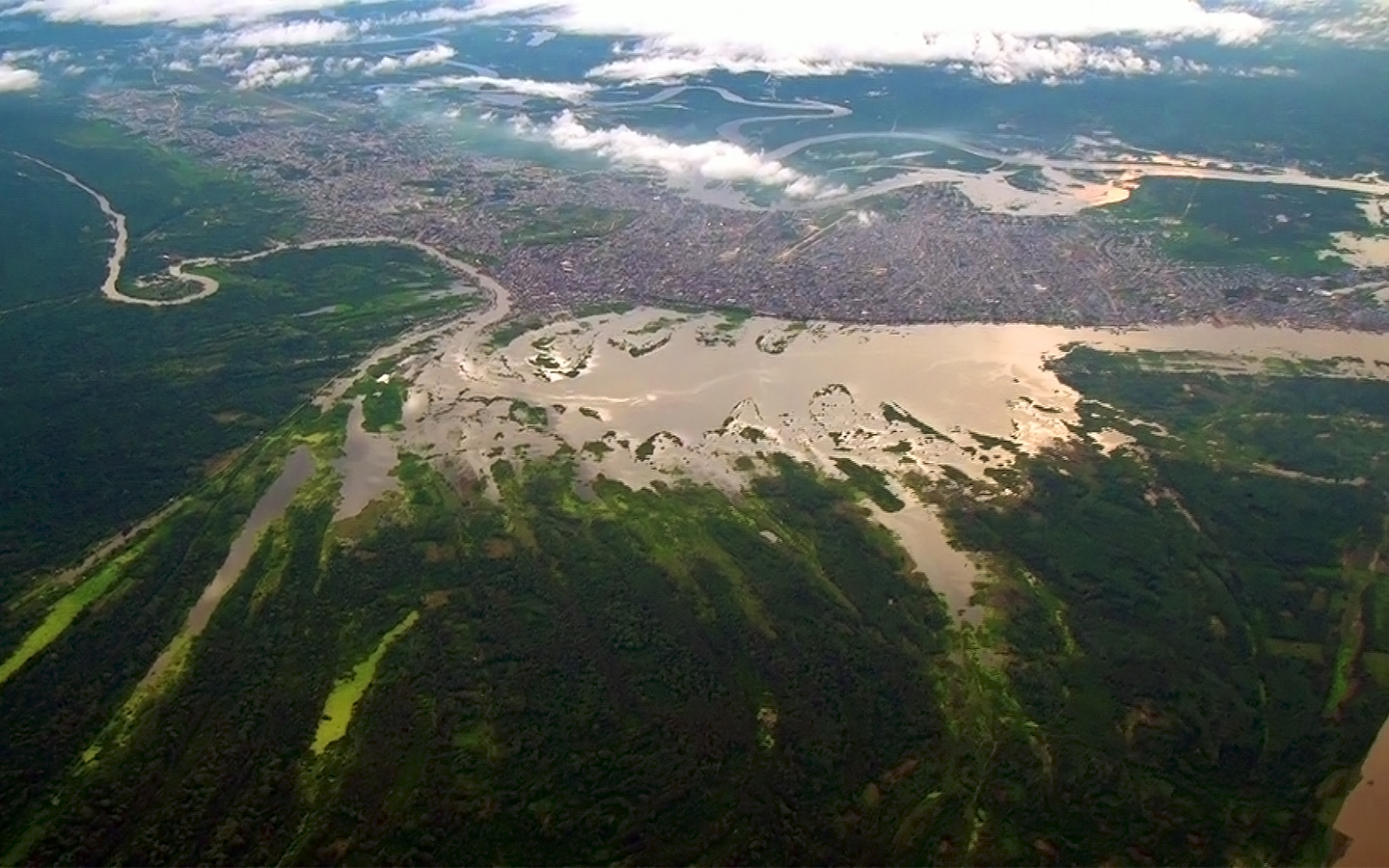 Iquitos desde el aire